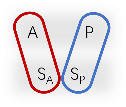 中文（中国大陆）: 句法形态配列，SaA-SpP